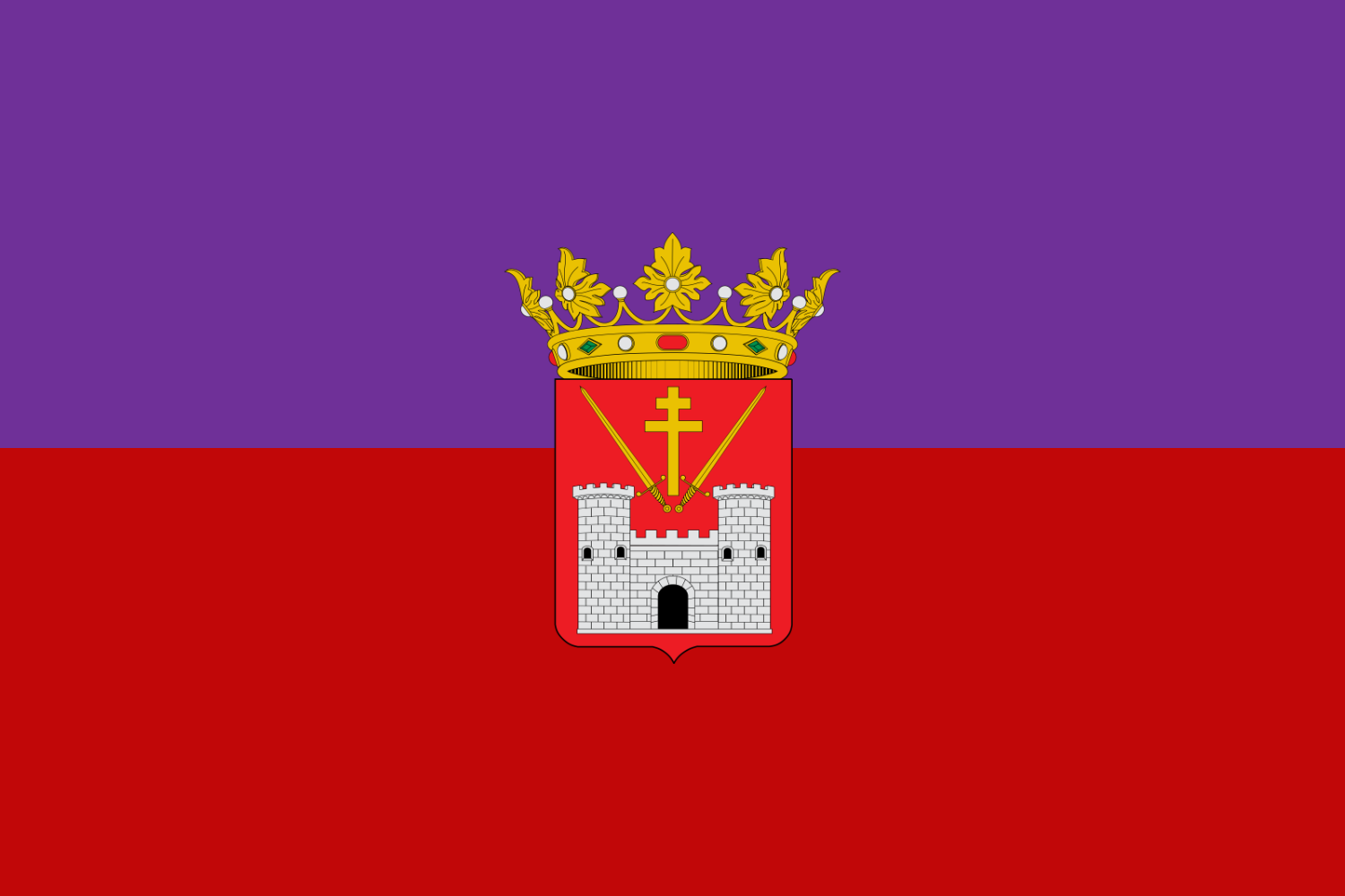 La bandera tiene las proporciones de 2:3 y está dividida en una parte superior y otra inferior. La parte superior es de color morado mientras que la parte inferior es de color rojo oscuro.